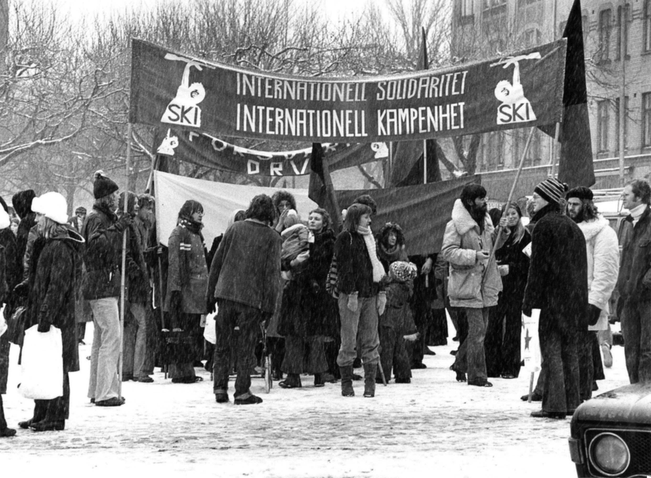 Anti Vietnam War demonstration in Lund, Sweden